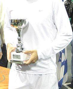 חזקת מטלטלין. תמונה גזורה מתוך תמונה אחרת